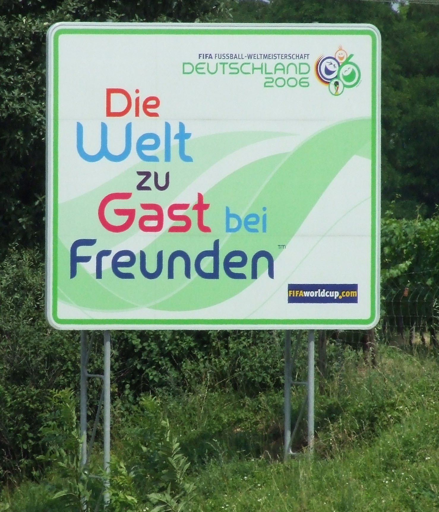 Bundesautobahn 63, Streckenabschnitt bei Udenheim, zwischen Autobahnkilometer 14,5 und 14,0